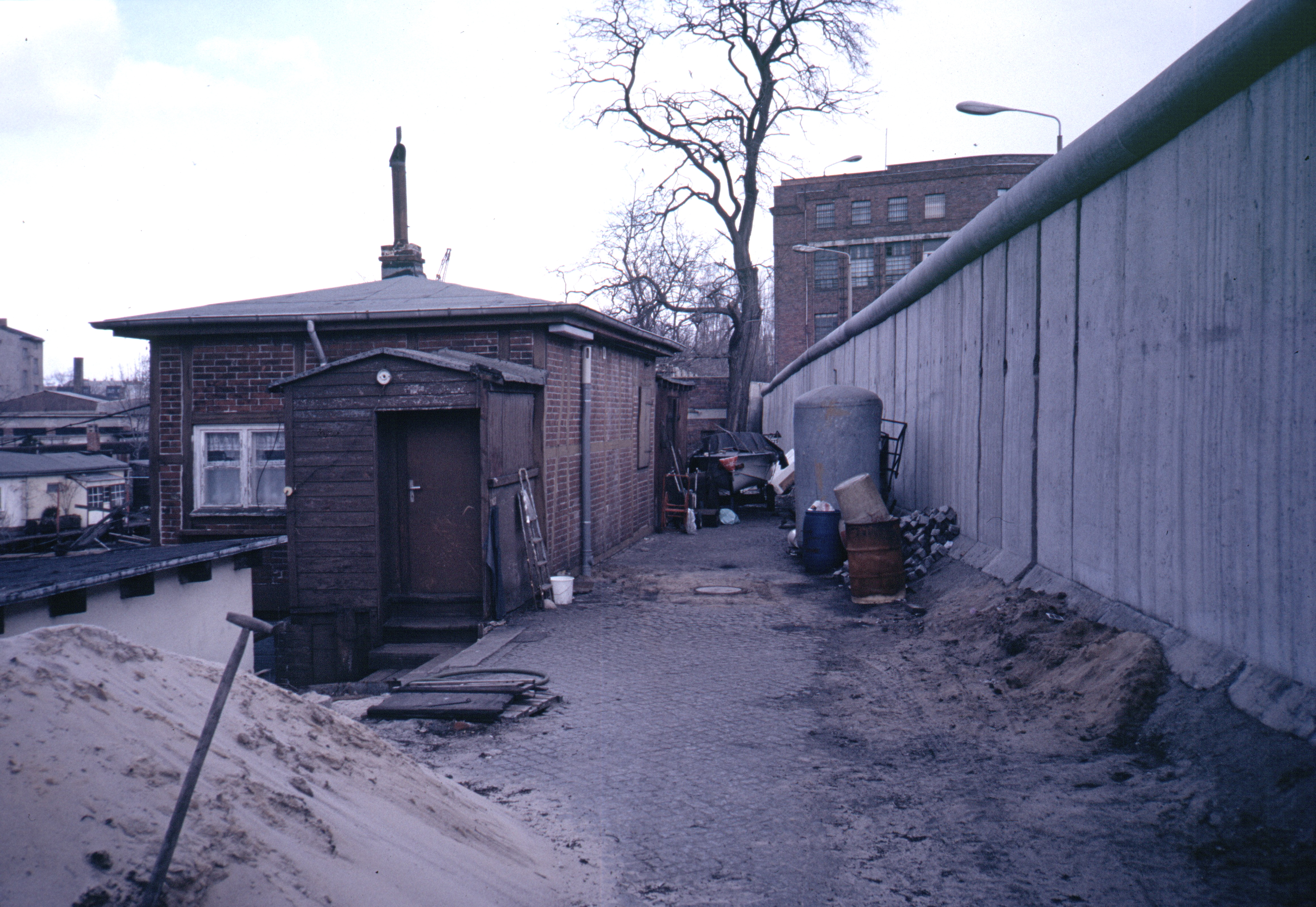 Berlin Schlesische Straße / Am Flutgraben